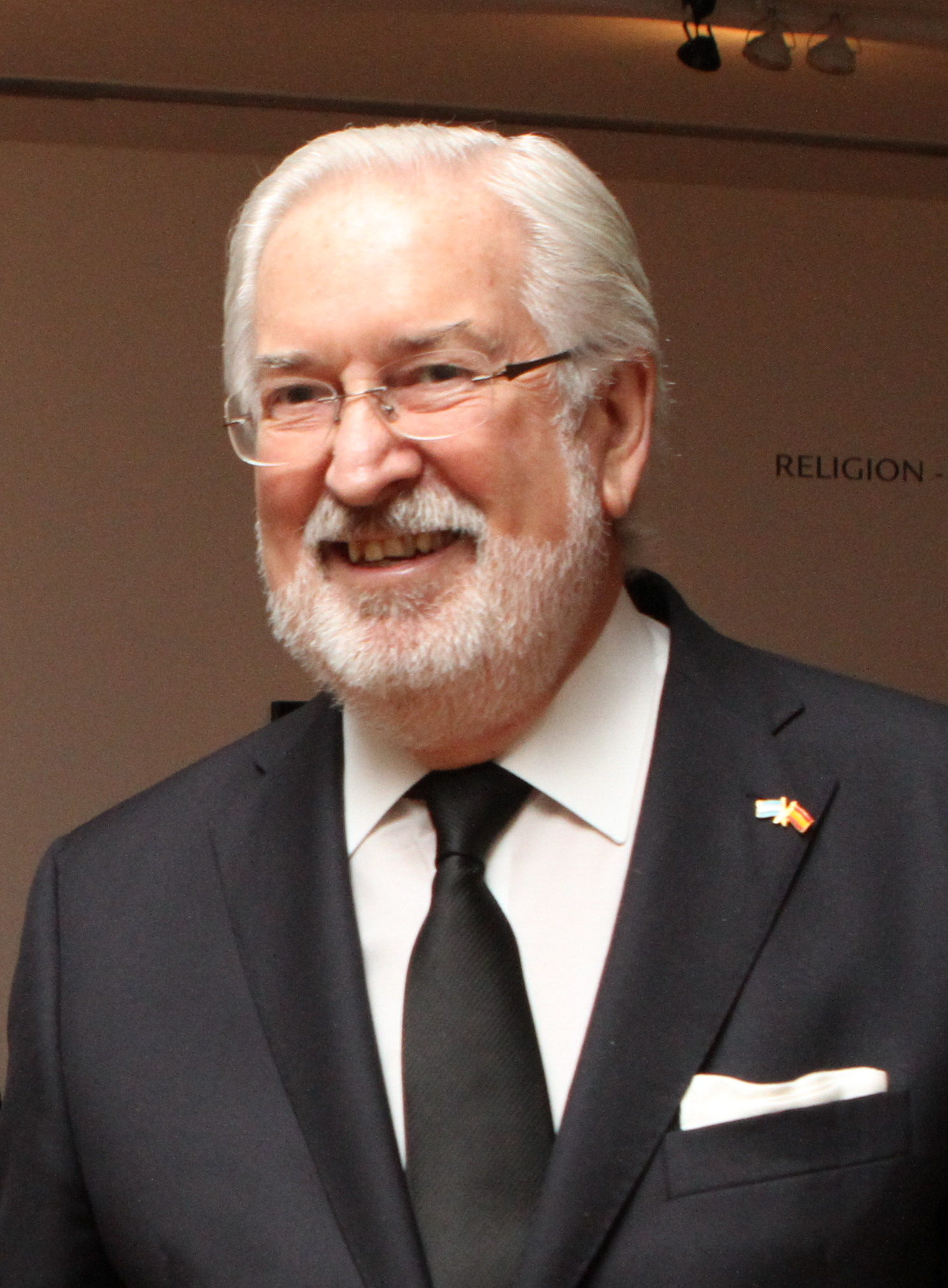 Buenos Aires, 25 de marzo de 2014 E Museo Nacional de Bellas Artes inauguró el 25 de marzo, La mirada en el otro, exposición fotográfica curada por Carmen de la Guerra y Javier Díez. La inauguración estuvo a cargo de la directora ejecutiva del Museo Nacional de Bellas Artes, Marcela Cardillo, y del embajador de España en la Argentina, Estanislao de Grandes Pascual. ​La exposición organizada porel Museo Nacional de Bellas Artes (MNBA) y producida en España por el Ministerio de Educación, Cultura y Deporte, cuenta con el apoyo del Ministerio de Asuntos Exteriores y Cooperación de España para su itinerancia internacional y la colaboración de la Oficina Cultural de la Embajada de España para su presentación en Argentina. Es una muestra colectiva que reúne una selección antológica, síntesis de la historia de la fotografía española de los últimos sesenta años. En ella está representada la sociedad de la posguerra, con piezas de Gabriel Cualladó, Ramón Masats, Carlos Pérez Siquier o Joan Colom, la generación de fotógrafos que inician su trayectoria en los años 70, con el trabajo documental de Cristina Garcia Rodero, el universo particular de Toni Catany y del argentino, afincado en España , Humberto Rivas, pasamos a los los años 80, el período más pop con obras de creadores pertenecientes a la “movida madrileña”, como Alberto García-Alix, Pablo Pérez –Mínguez y Ouka Leele y nos adentramos en las últimas tendencias actuales de la fotografía conceptual a través de fotógrafos como Chema Madoz, Joan Fontcuberta, Manuel Vilariño o Bleda y Rosa." Fotos: Silvina Frydlewsky / Secretaría de Cultura de la Presidencia de la Nación